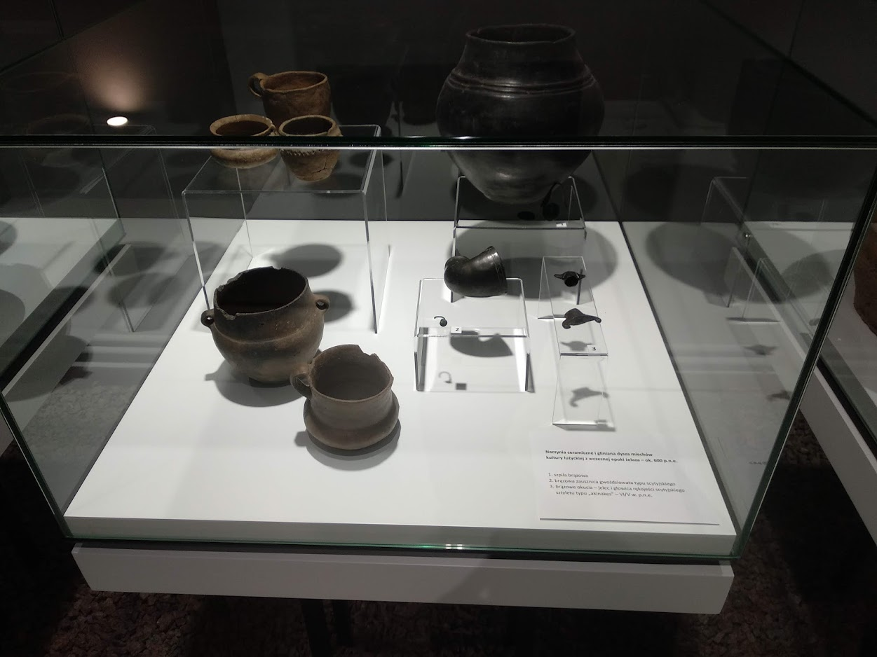 Muzeum Historii Włocławka (2019 r.)